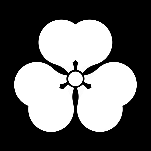 「片喰」紋（染抜）